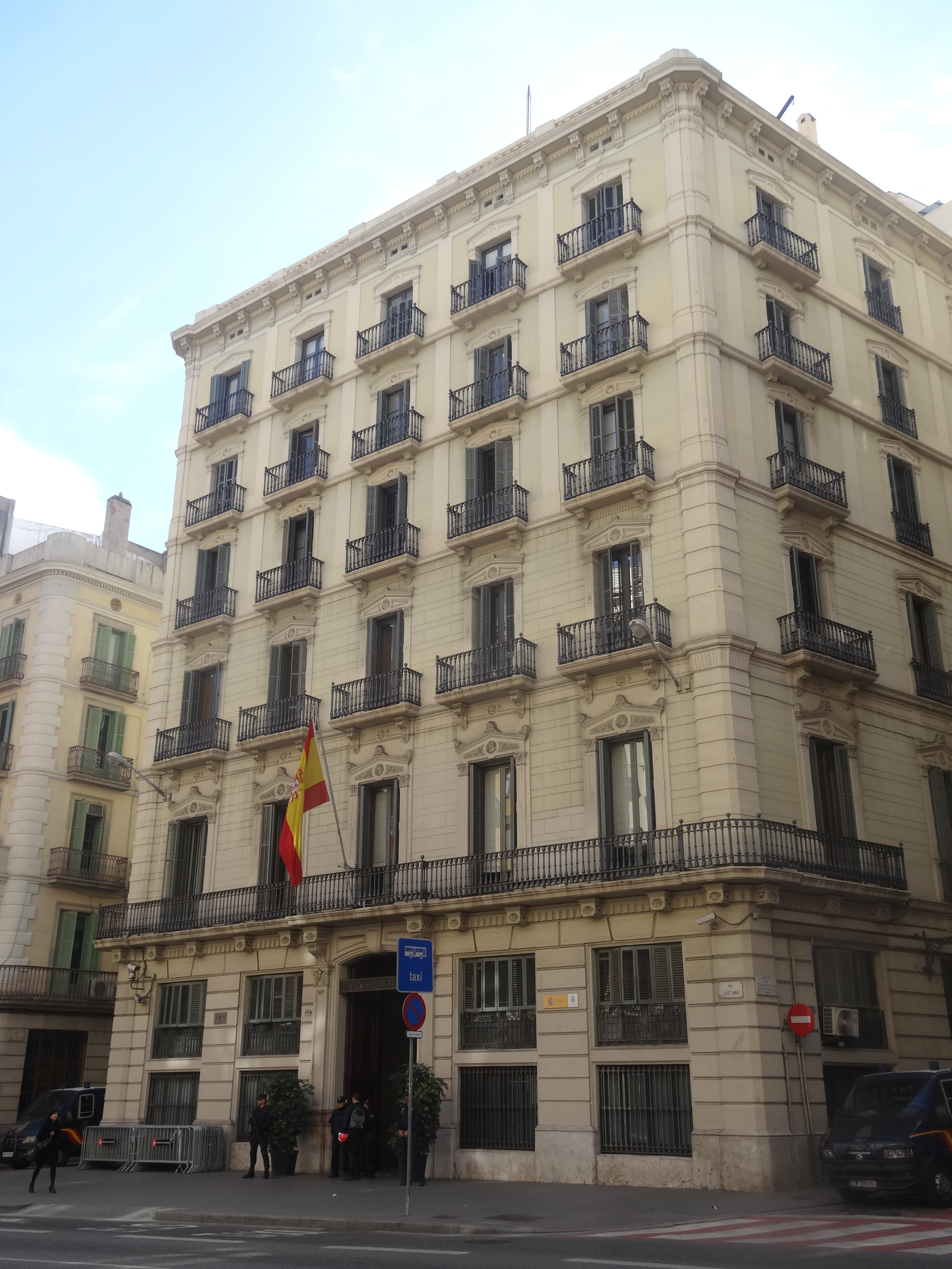 Comissaria de la Policia Nacional - Via Laietana, Barcelona.